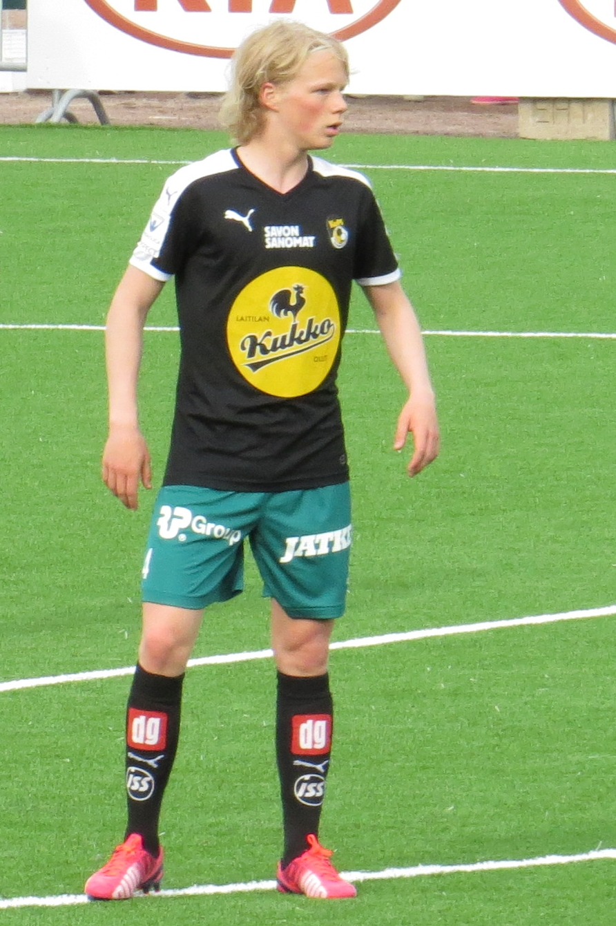 Urho Nissilä, suomalainen jalkapalloilija Kuopion Palloseuran joukkueessa kaudella 2015.